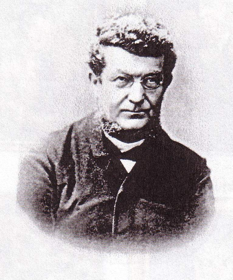 Conrad Wilhelm Albrecht Thaer (1828-1906)